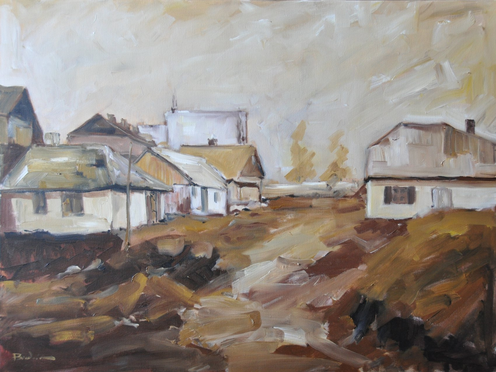 Widok Łęcznej namalowany na podstawie fotografii z lat 50. XX w., obraz po raz pierwszy prezentowany na wystawie w II 2012 r. w Centrum Kultury w Łęcznej.